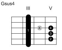 Eigenanfertigung